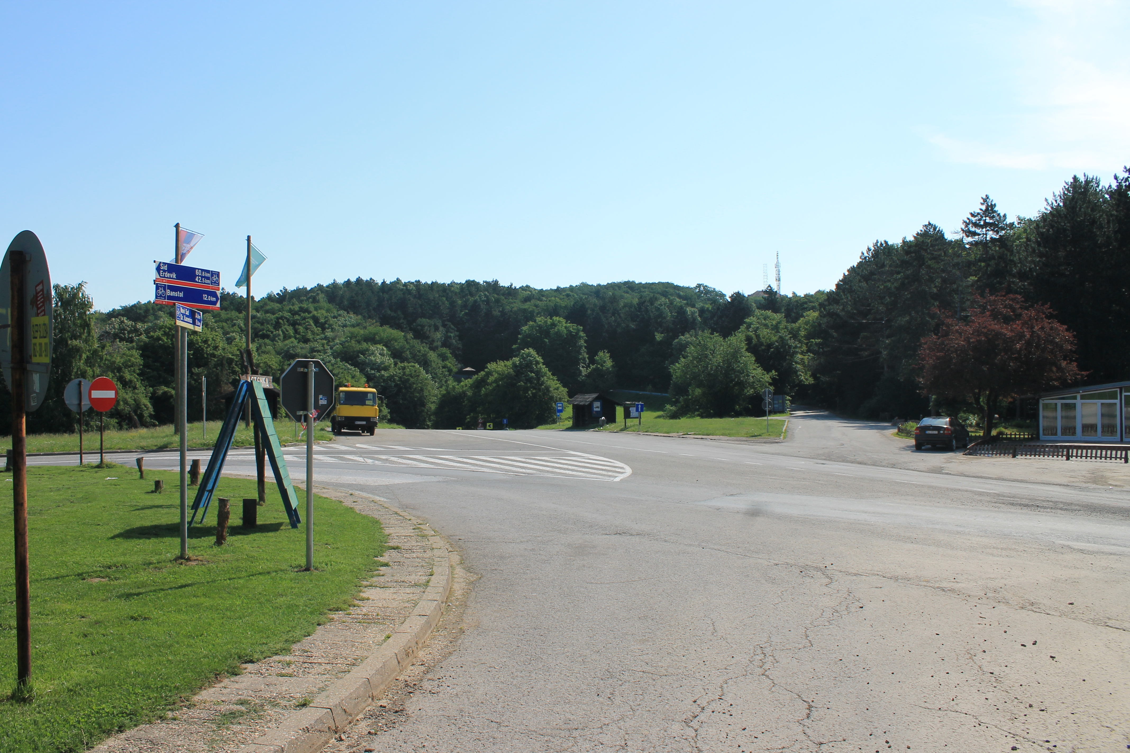 Iriški venac